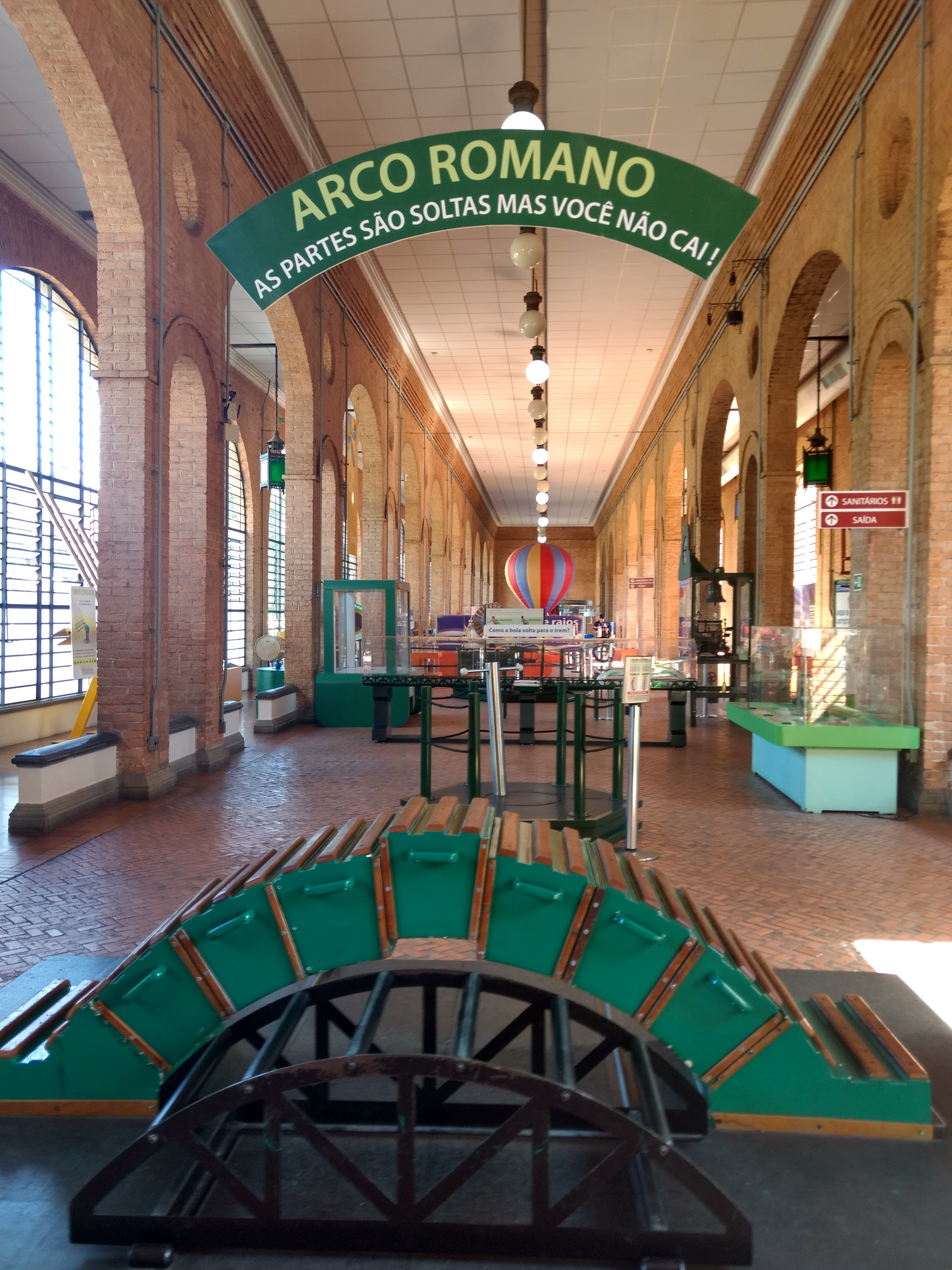 Catavento, arco romano.Sp.